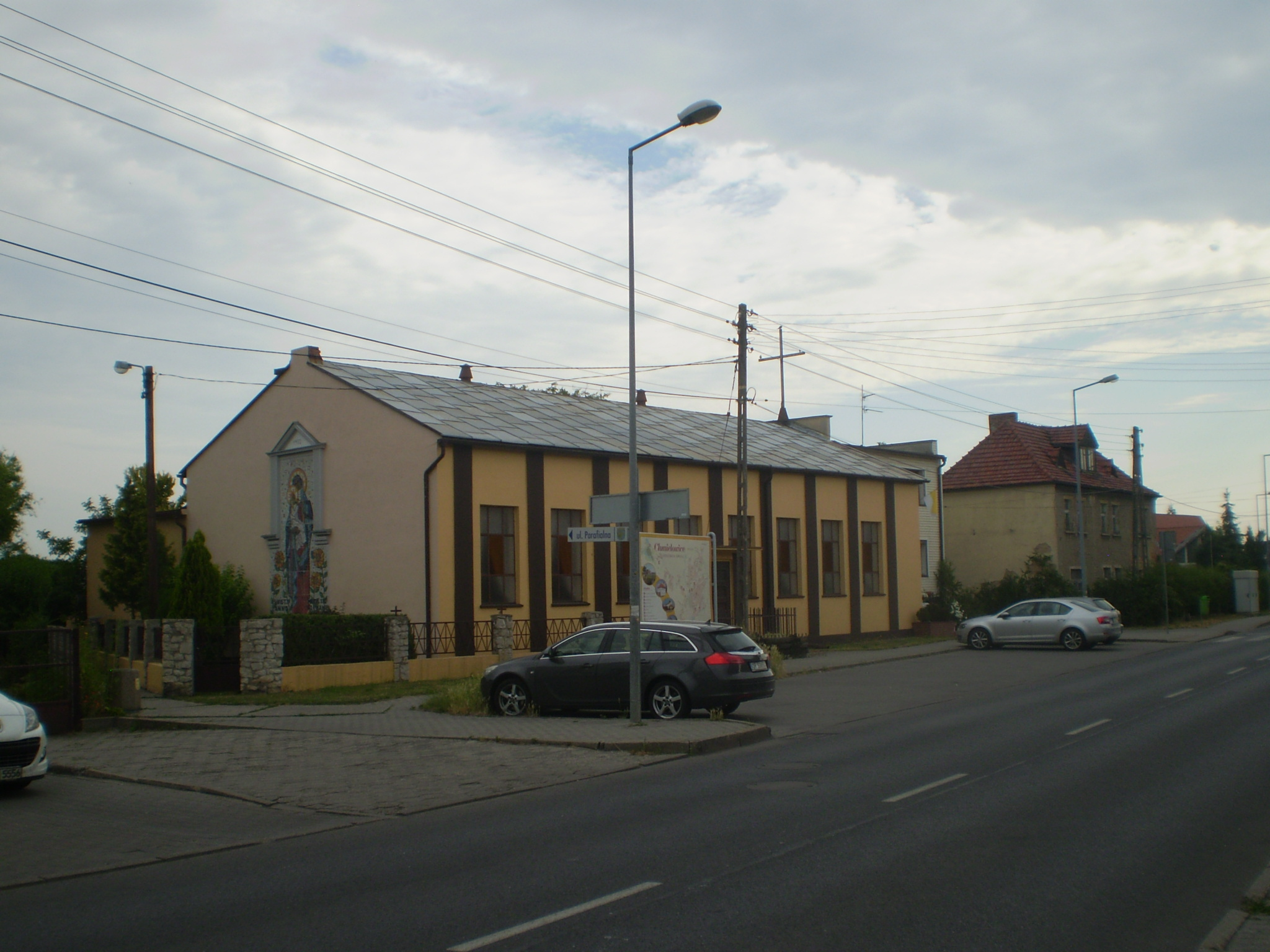 Fragment zabudowy w Opolu-Chmielowicach.Były kościół pw.św.Anny, wcześniejsza kaplica a do 1945 r.mieściła się tu gospoda.